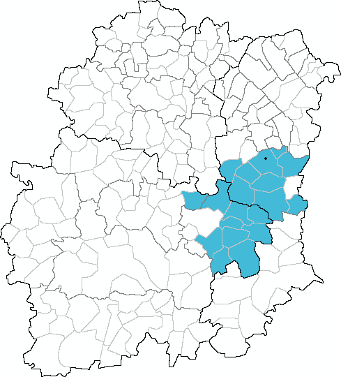 Aire de polarisation principale du lycée de Mennecy dans l'Essonne, d'après les données de l'inventaire communal de l'INSEE (1998)